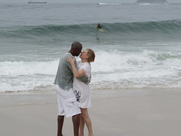 Os atores brasileiros Robson Caetano e Monique Lafond contracenam na série República do Peru, da TV Brasil.